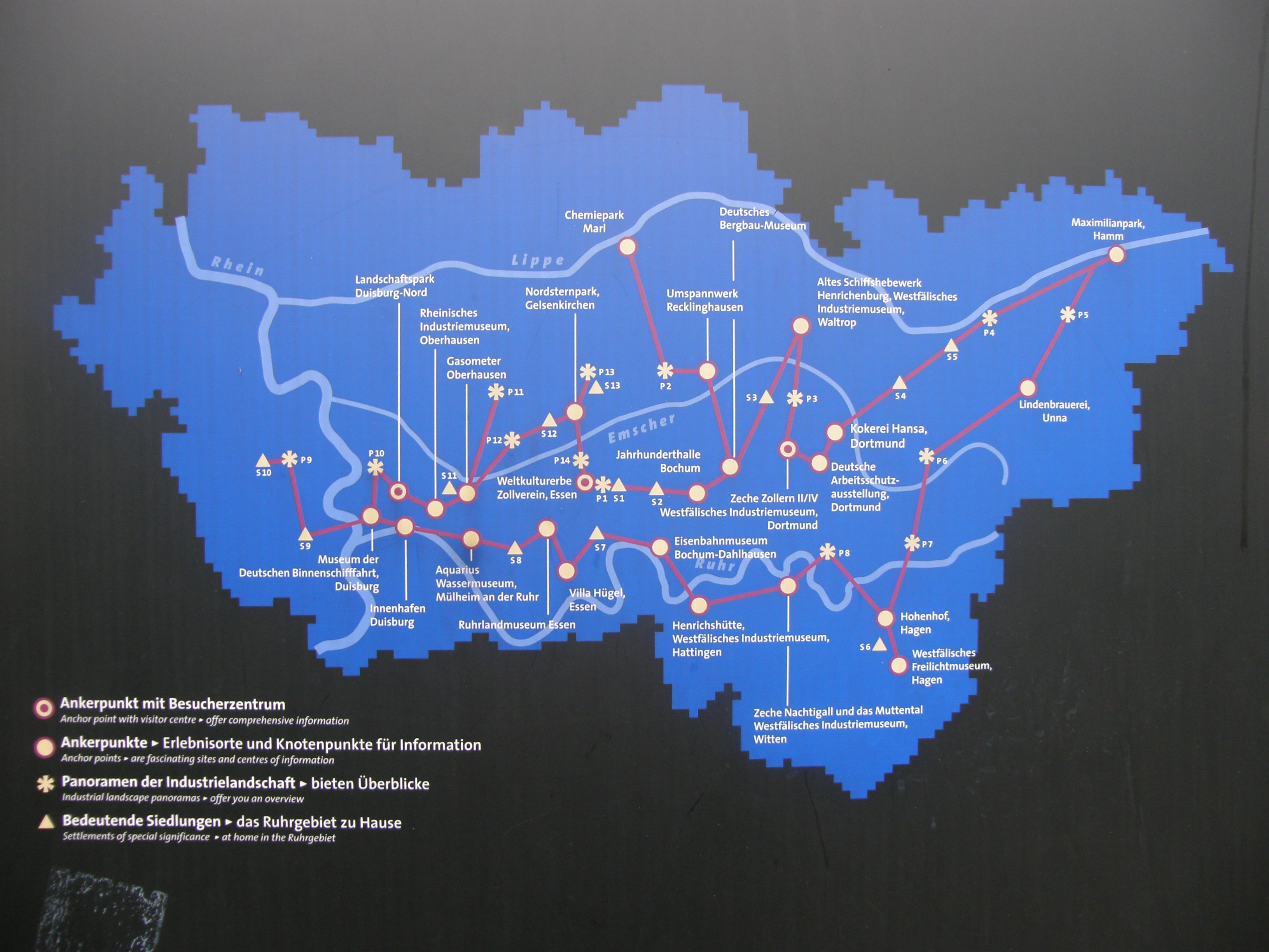 Route der Industriekultur (Informationsschild an einem der Standorte)